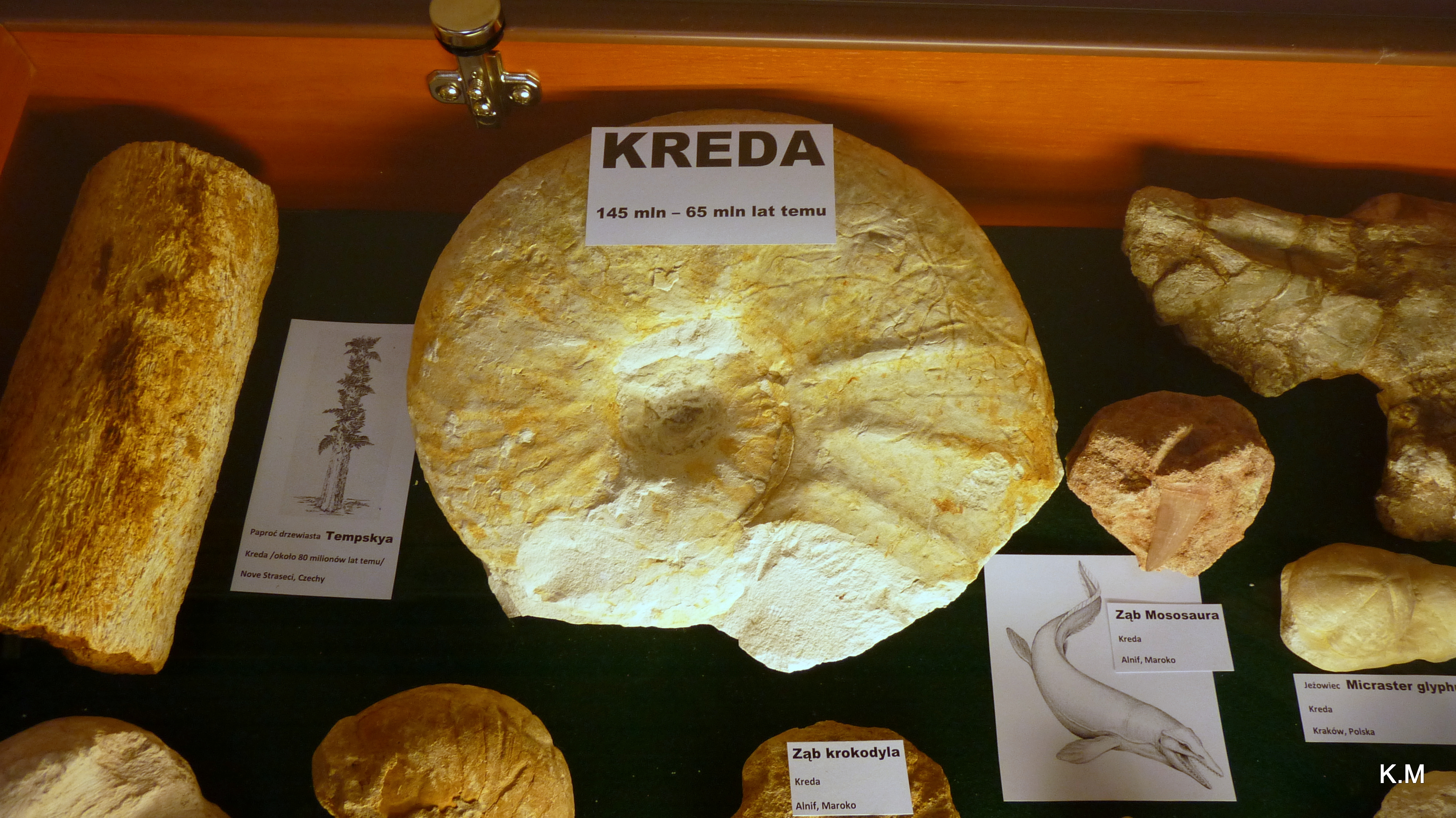 Żbiory skamieniałości.